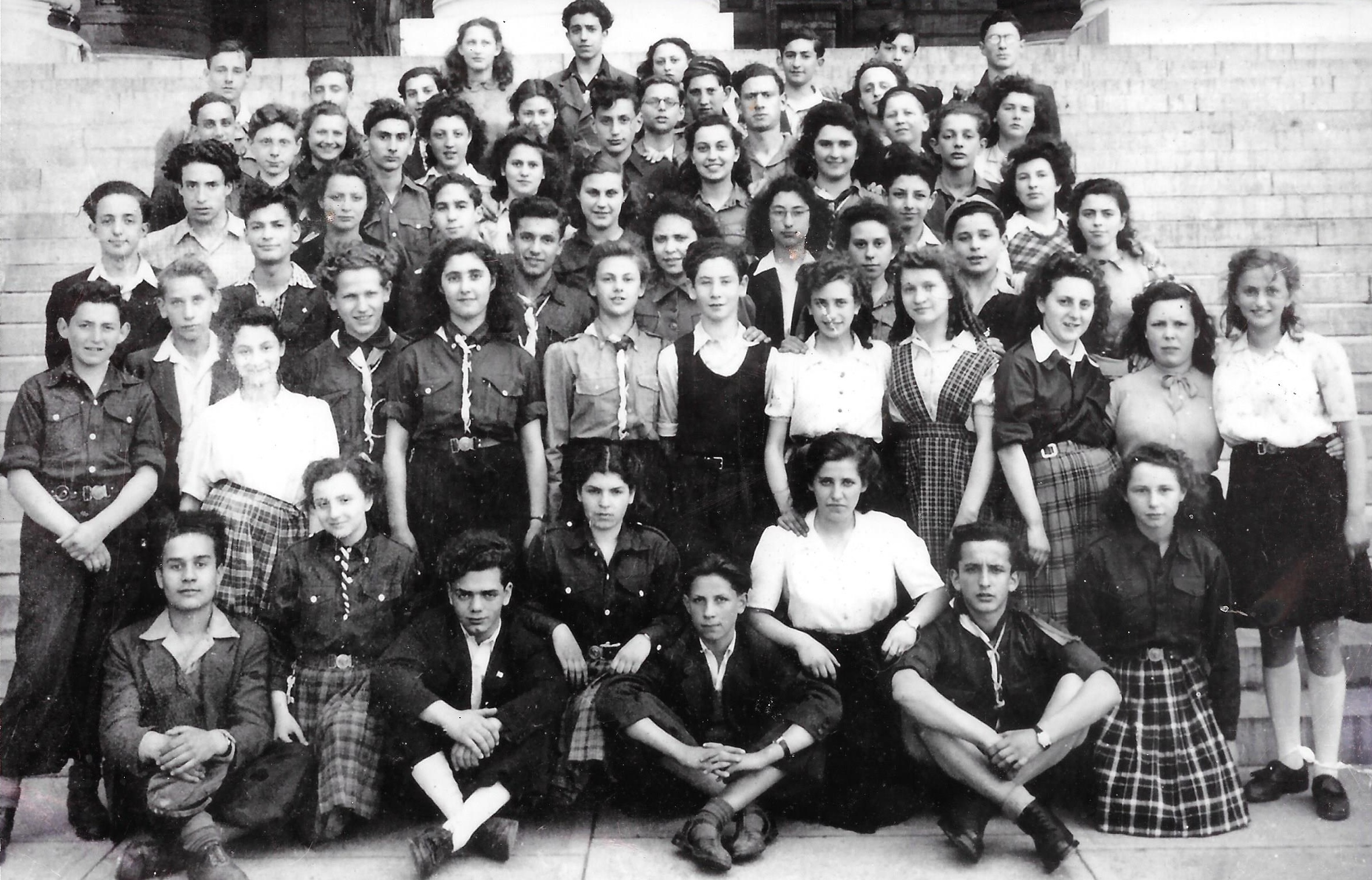 קבוצת פעילי תנועת 'גורדוניה' בבריסל לפני עלייתם ארצה 1946